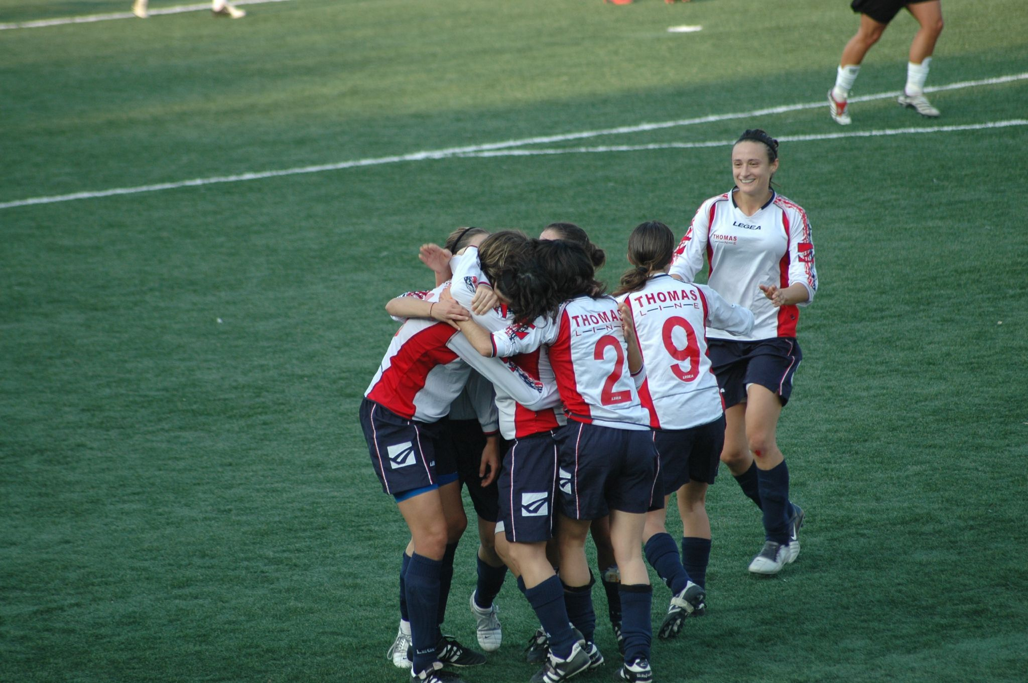 Esultanza dopo il Gol